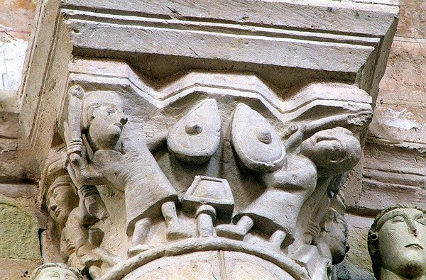 Arivault